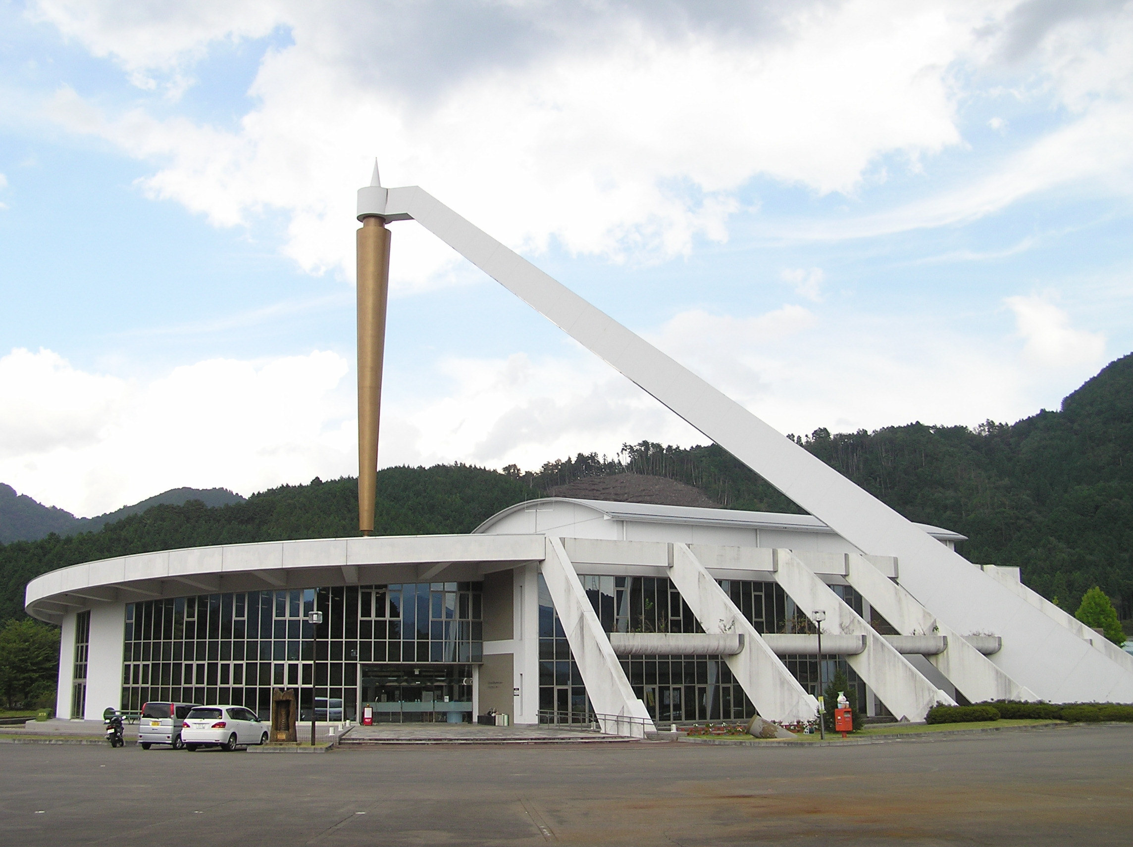 日本真ん中センター（岐阜県郡上市）。